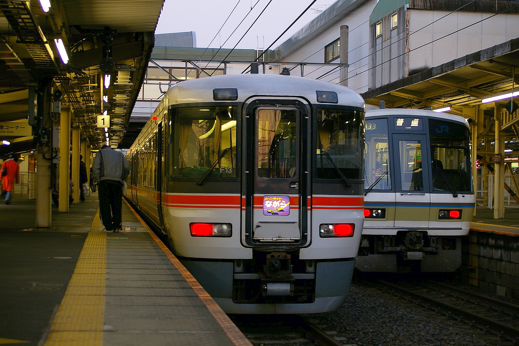 Ml-nagara003